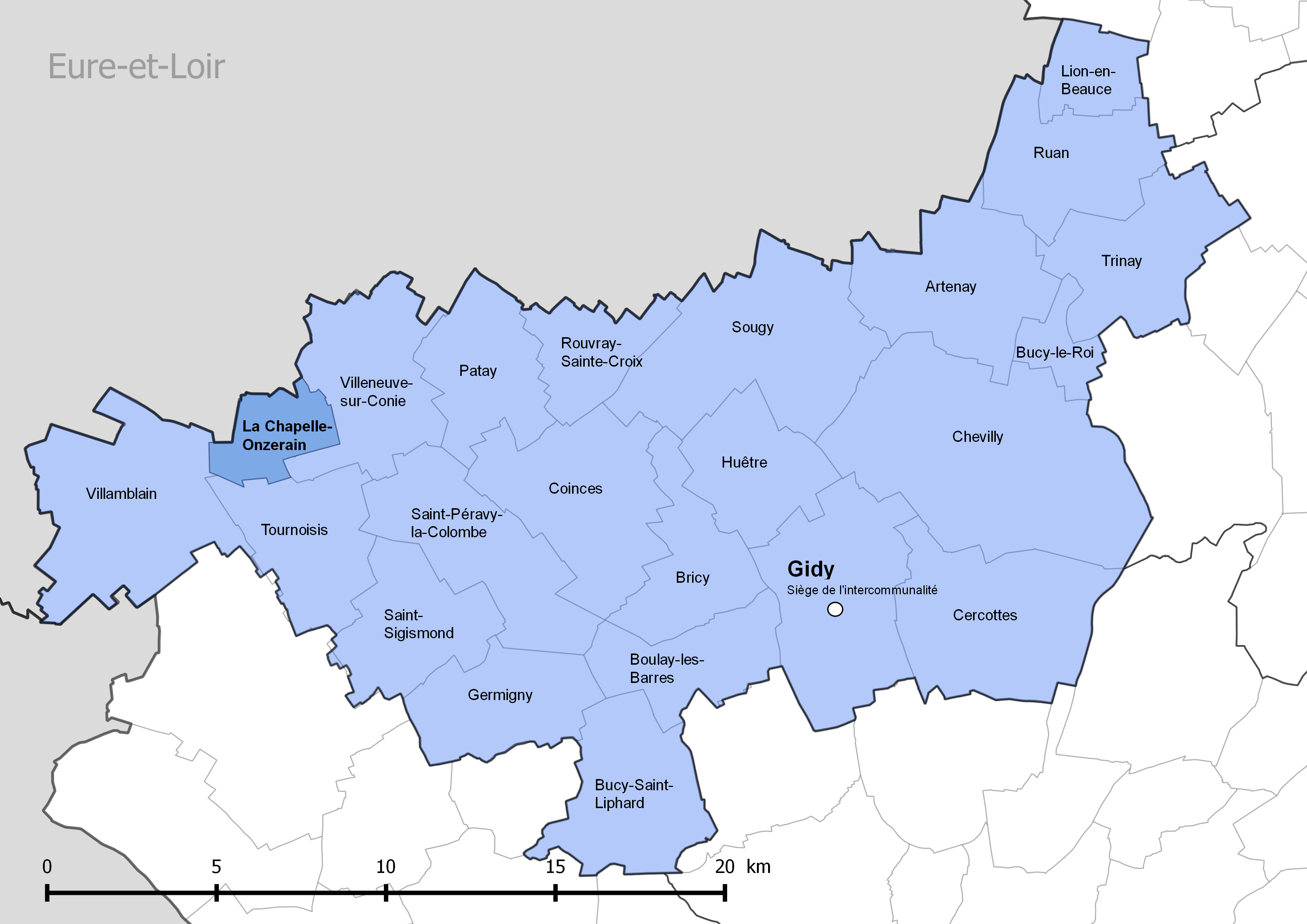 Périmètre de la communauté de communes de la Beauce loirétaine - Situation de la commune de La Chapelle-Onzerain